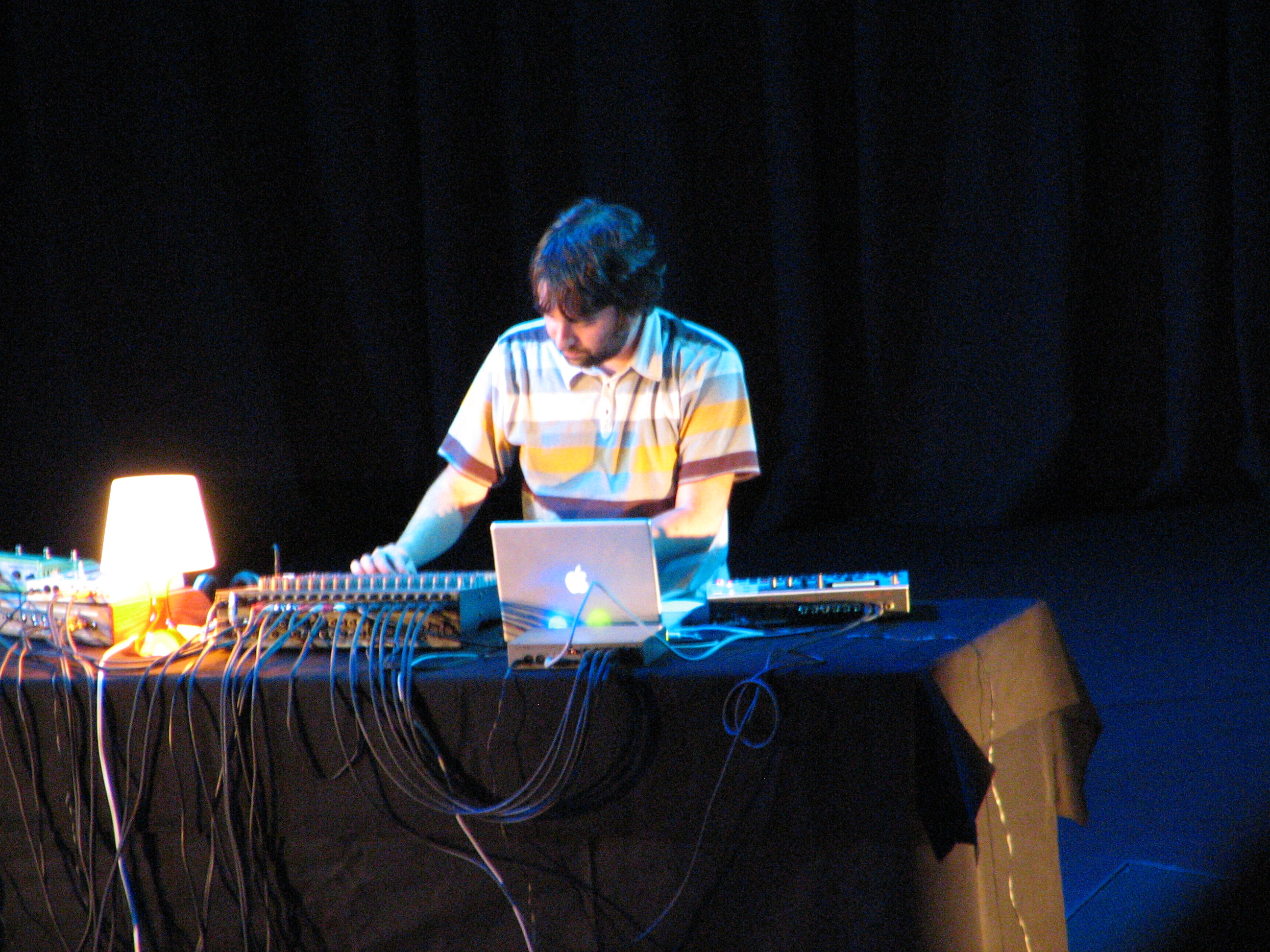 Dntel